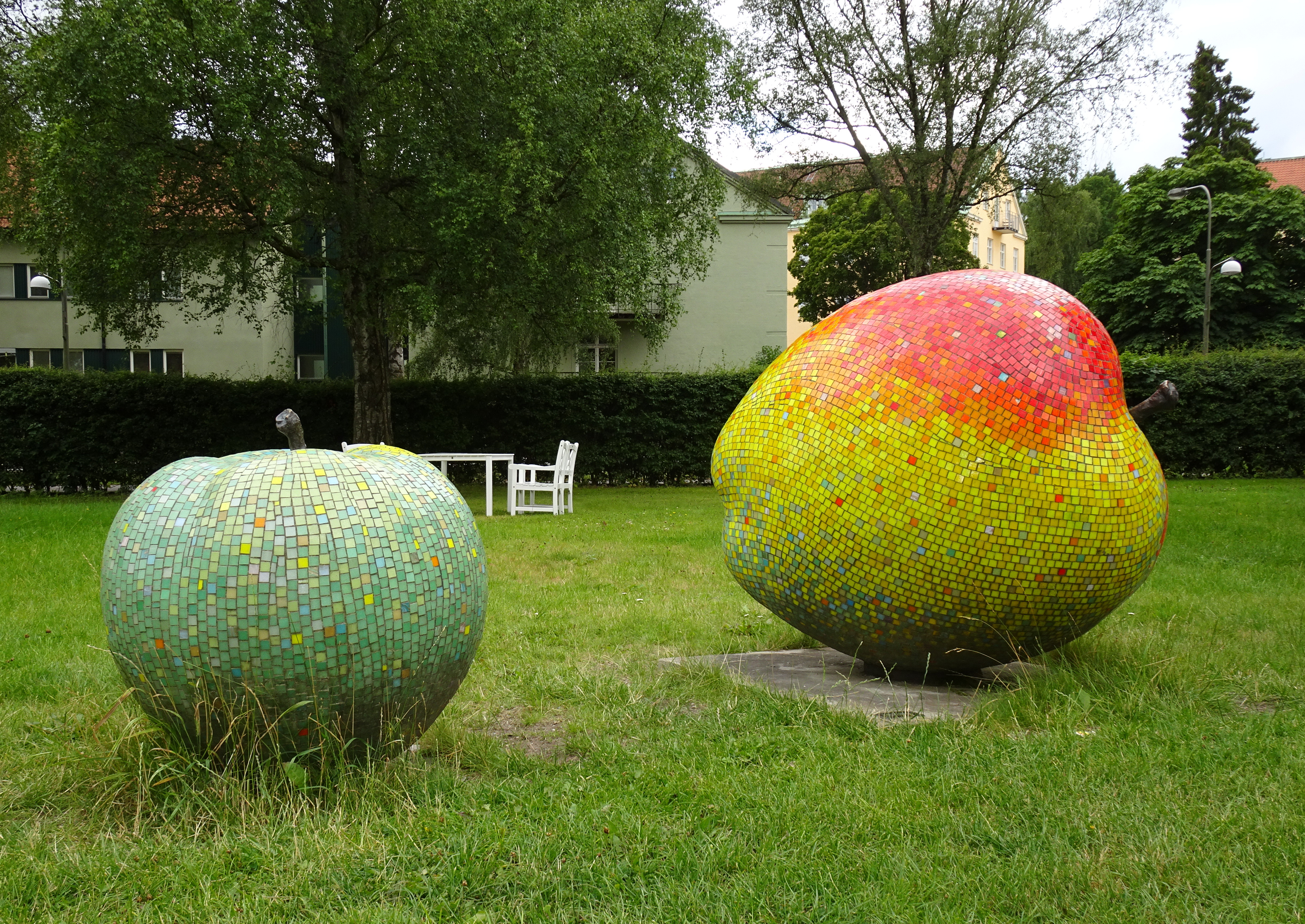 Mosaik Äpplen av Ann-Charlott Fornhed i Gammelbyn i Stureby